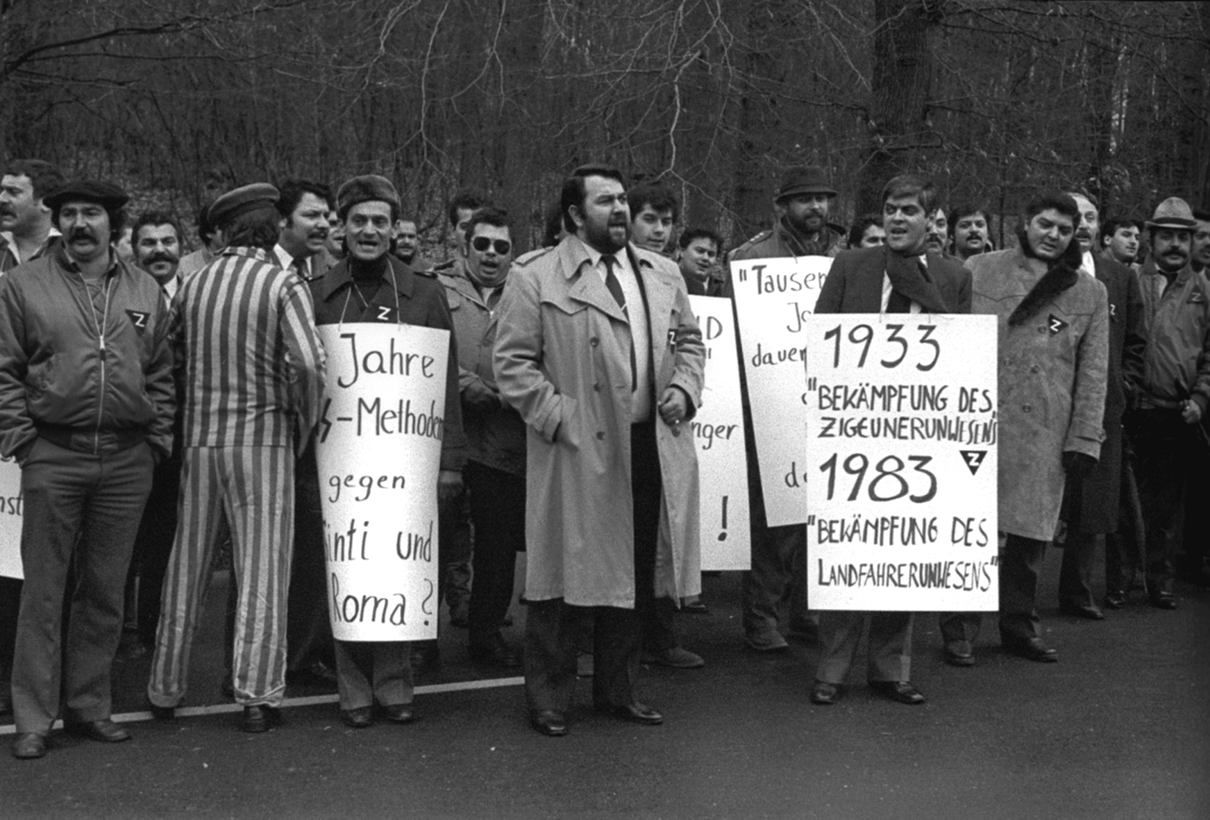 Bürgerrechtsbewegung: Kampf um Rechte – erst ihre Bürgerrechtsbewegung verleiht den Sinti und Roma eine Stimme